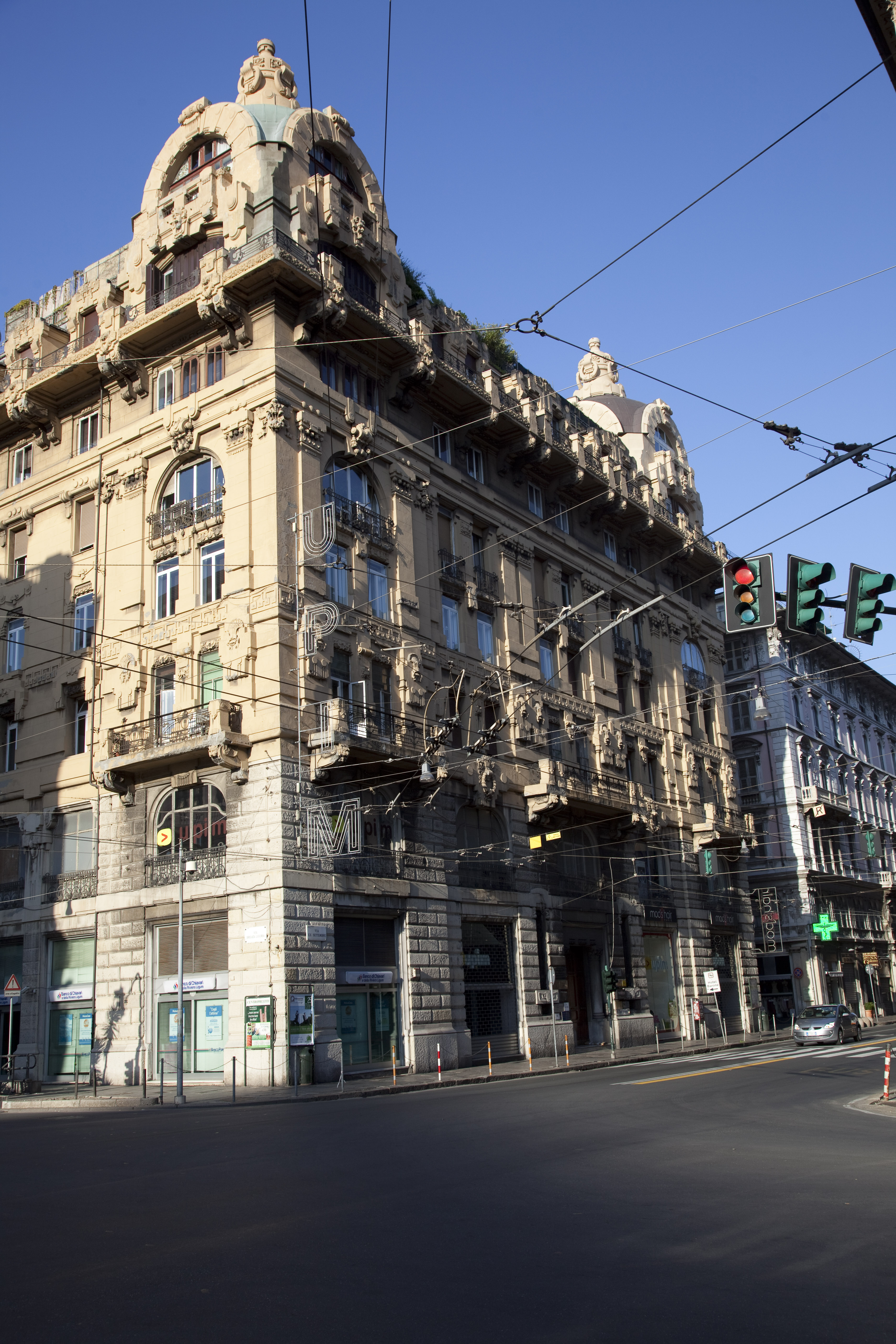 Palazzo in stile liberty all'angolo tra via XX settembre e via brigata Liguria a Genova This is a photo of a monument which is part of cultural heritage of Italy.